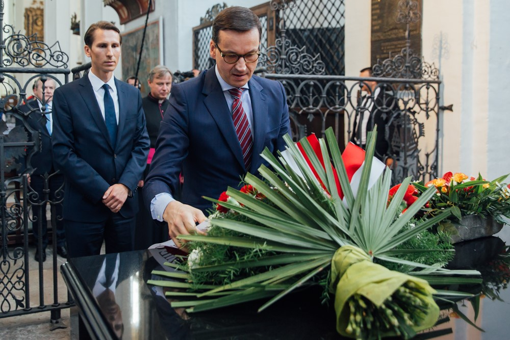 Premier Mateusz Morawiecki składa wieniec na sarkofagu śp. Macieja Płażyńskiego, jednej z 96 Ofiar Tragedii w Smoleńsku, w Bazylice Mariackiej w Gdańsku. Towarzyszą mu m.in.: syn Macieja Płażyńskiego - Kacper Płażyński, ks. Ireneusz Bradtke, min. Piotr Gliński. 2018.05.20 Gdańsk. Premier Mateusz Morawiecki wziął udział w spotkaniu z mieszkańcami Gdańska.